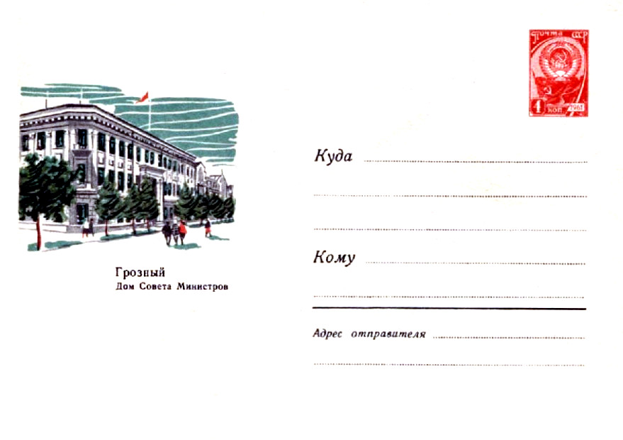 Грозный. Дом Совета Министров. Конверт СССР. 1967